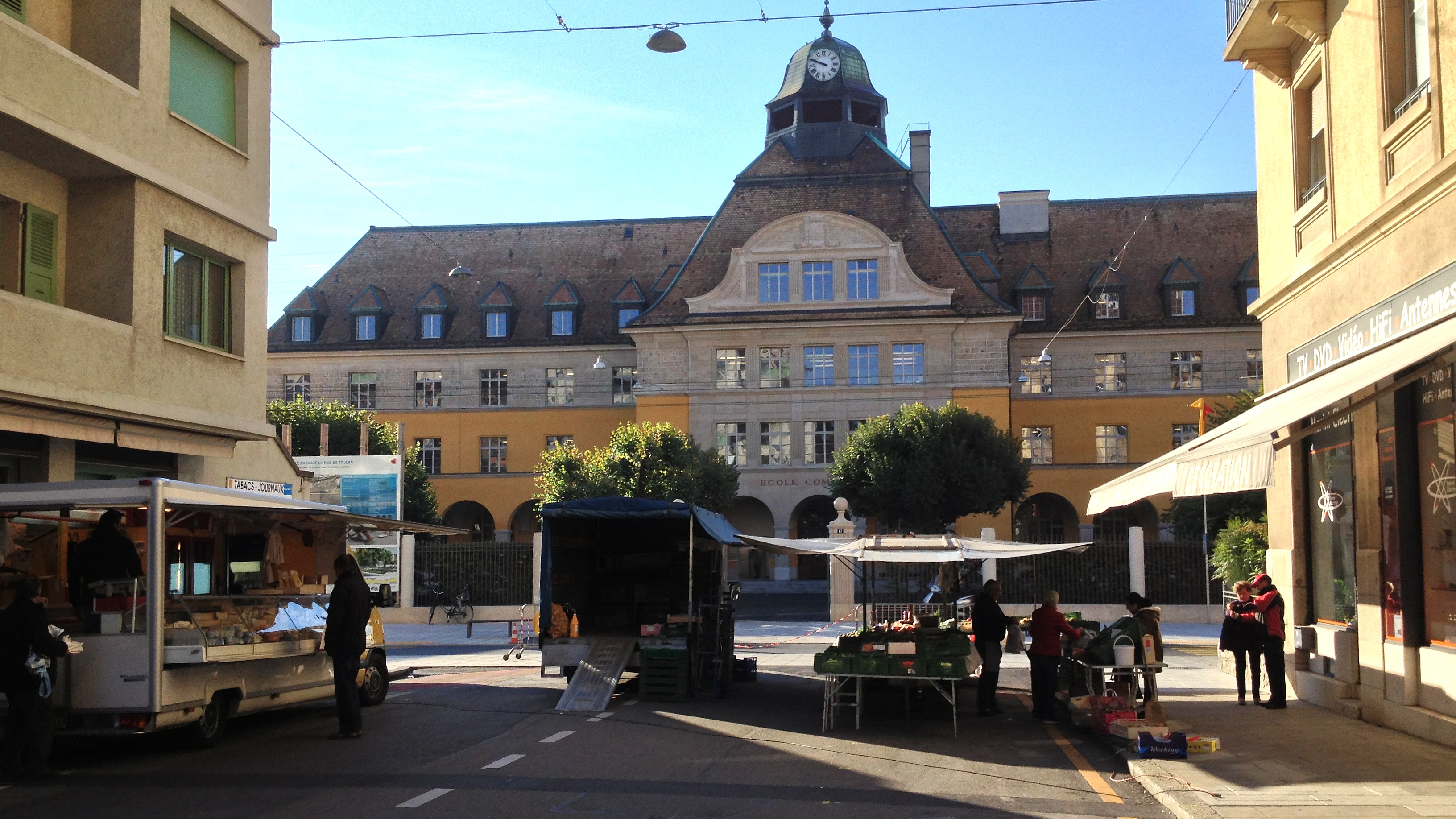 École primaire de la rue de Saint-Jean à Genève après rénovation.